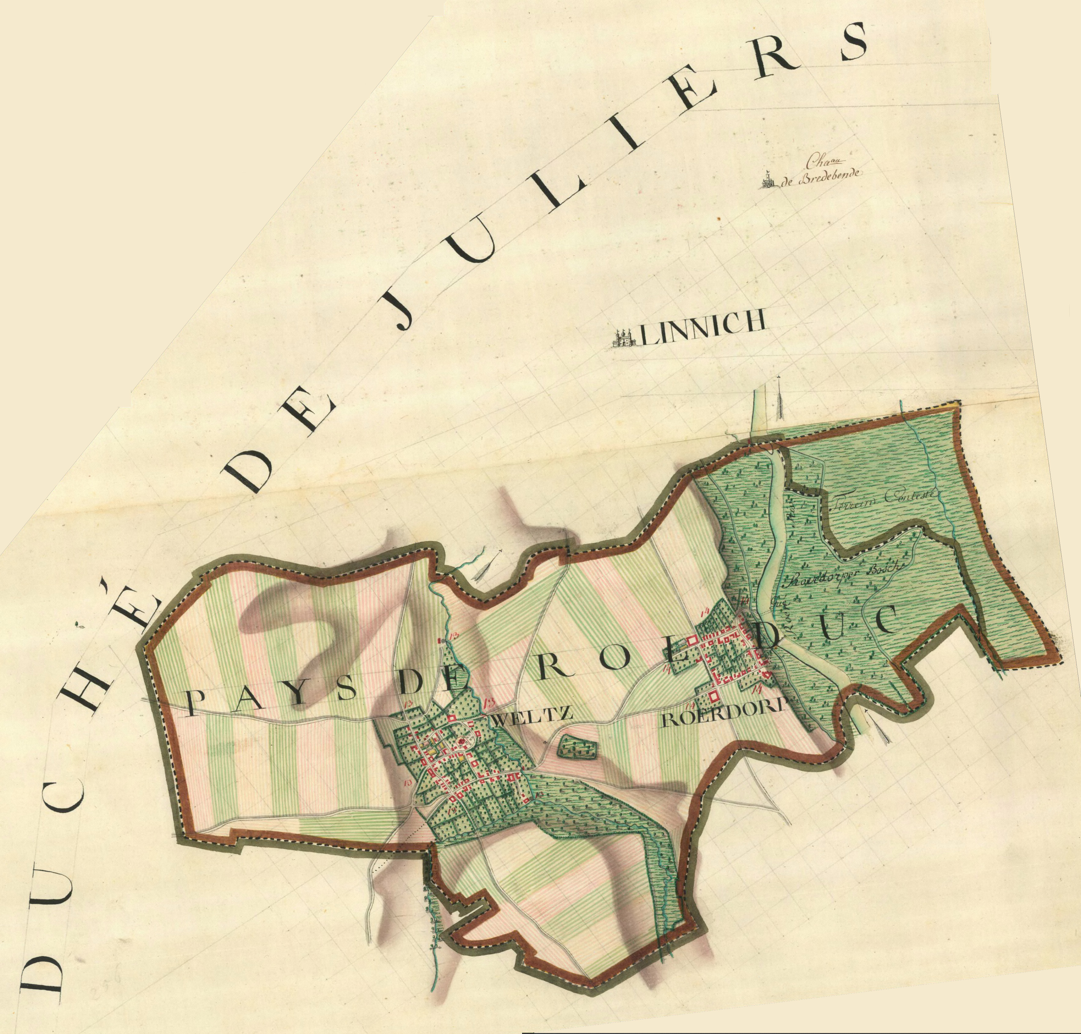 Auschnitt von Welz und Rurdorf aus der Cartes de Ferraris, 1771-1777